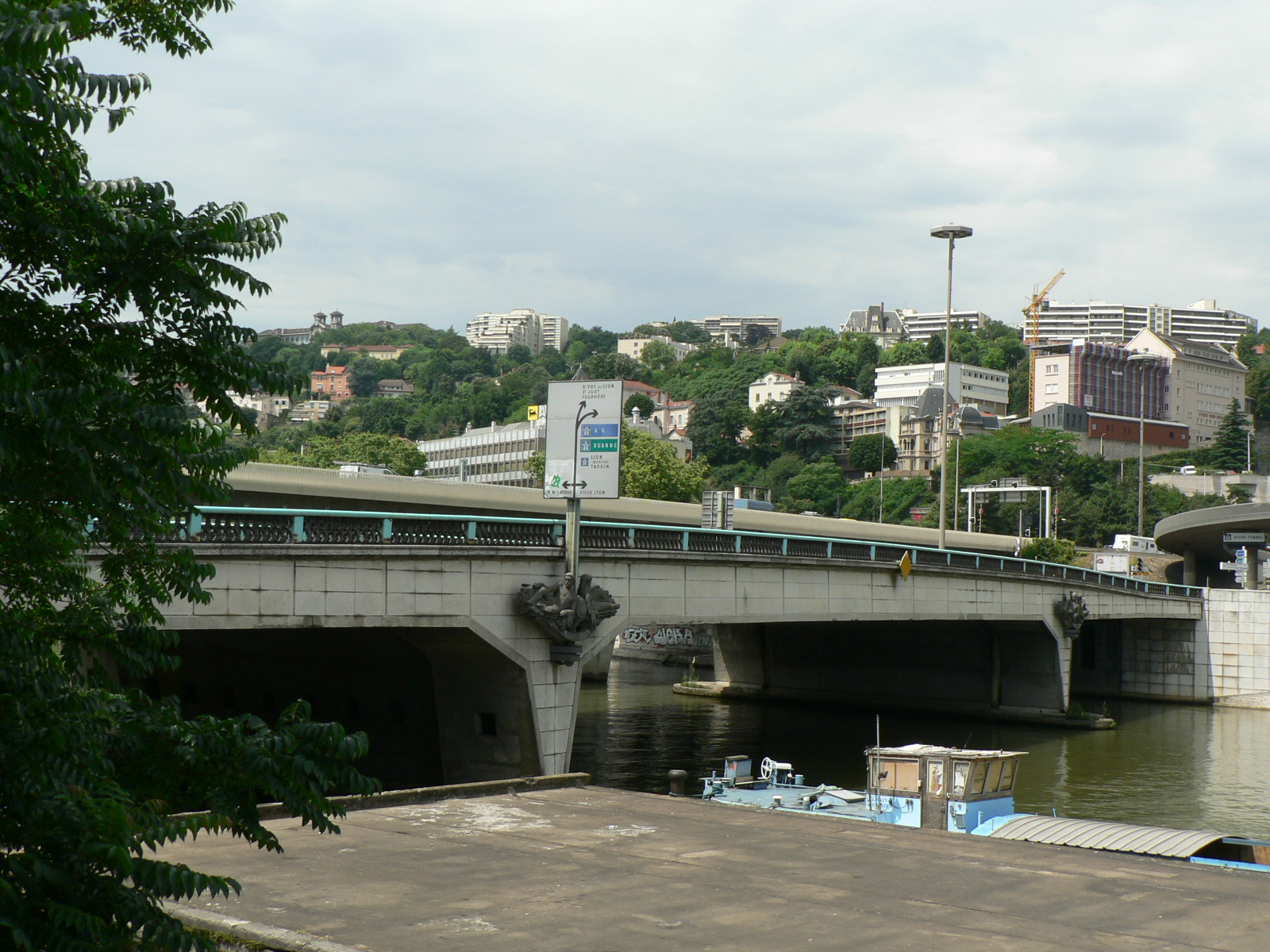 Ponts de Lyon- Pont Kitchener-Marchand